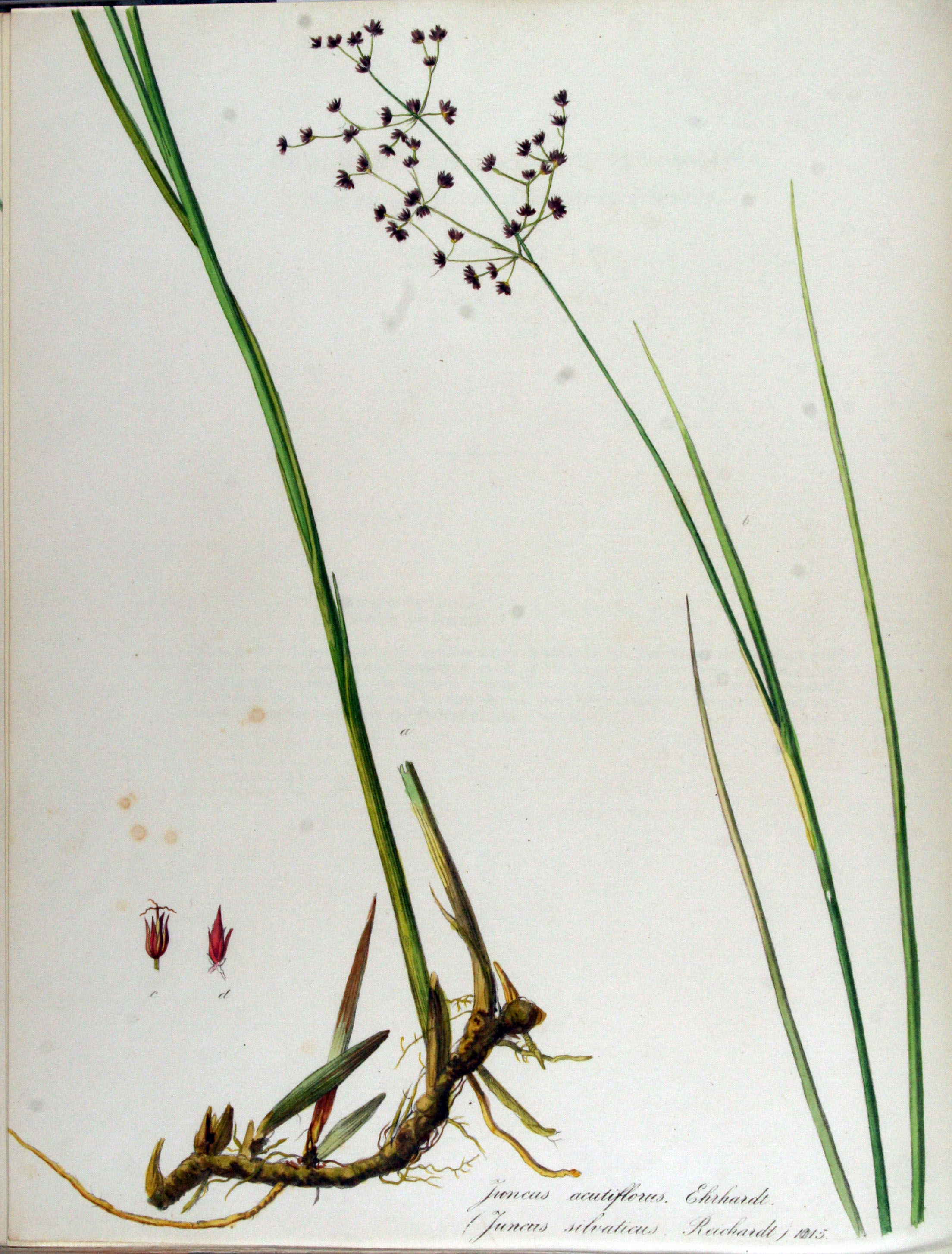 Juncus acutiflorus Ehr ex Hoffmann (Syn. Juncus sylvaticus auct. non Huds.